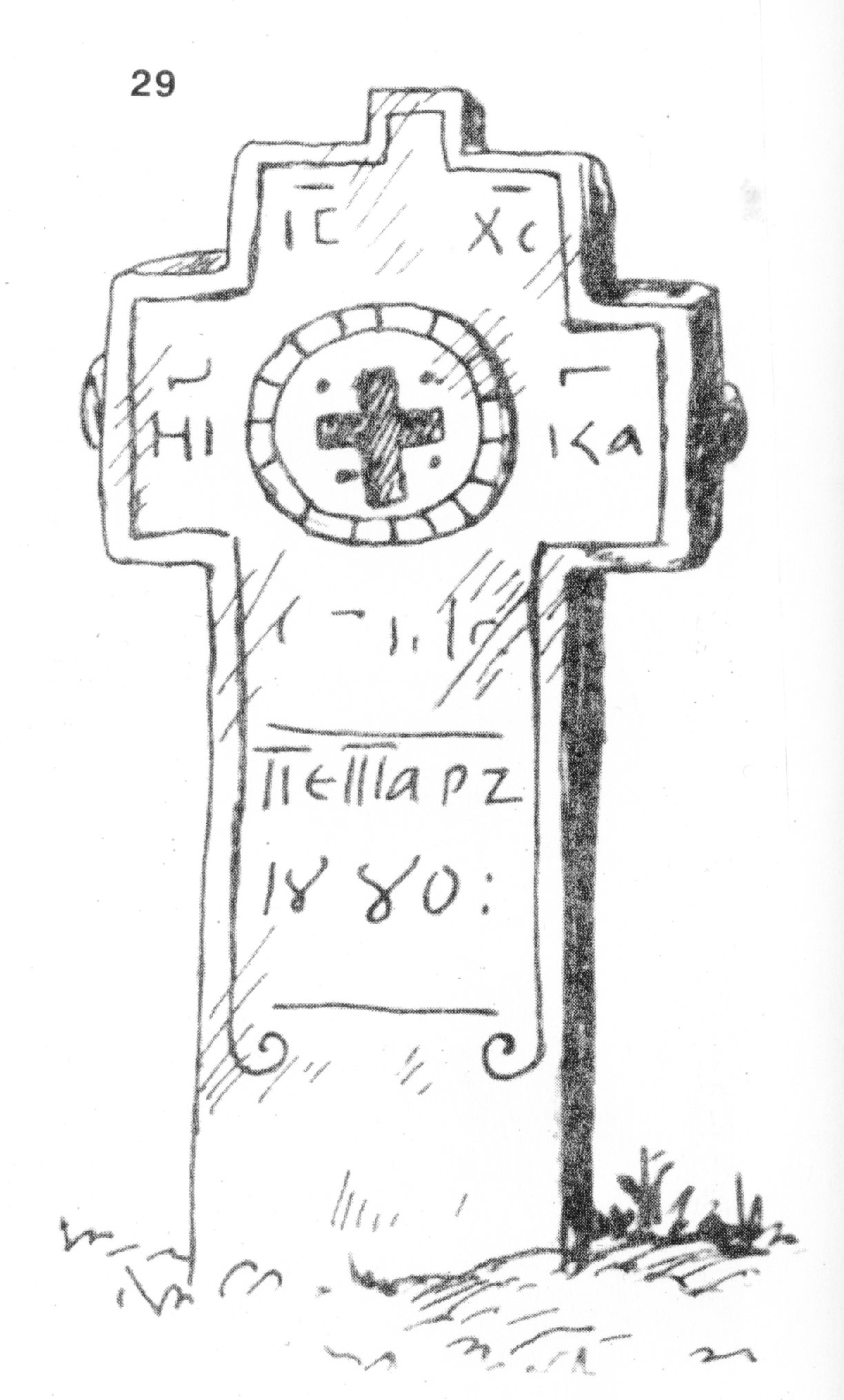 29. Кръст от бял пясъчник из гробищата на гр. Белоградчик. Горното му крило завършва с четвър­тита шапчица, а страничните с по една ябълка. Върху лицето са гравирани дълбоко монограм, венец с кръстче, надпис и дата 1880 г. Размери: 130x68x17 см. Скициран на 10.VIII.1930 г. (Т. 13, обр. 12.)